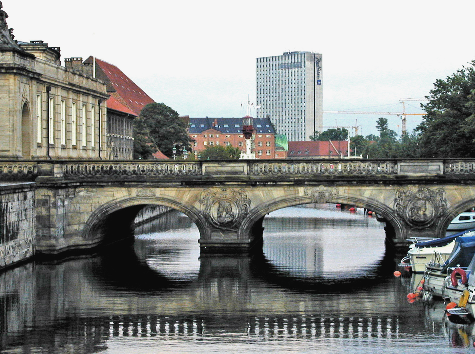 Højhusbyggeri ved Frederiksholms kanal